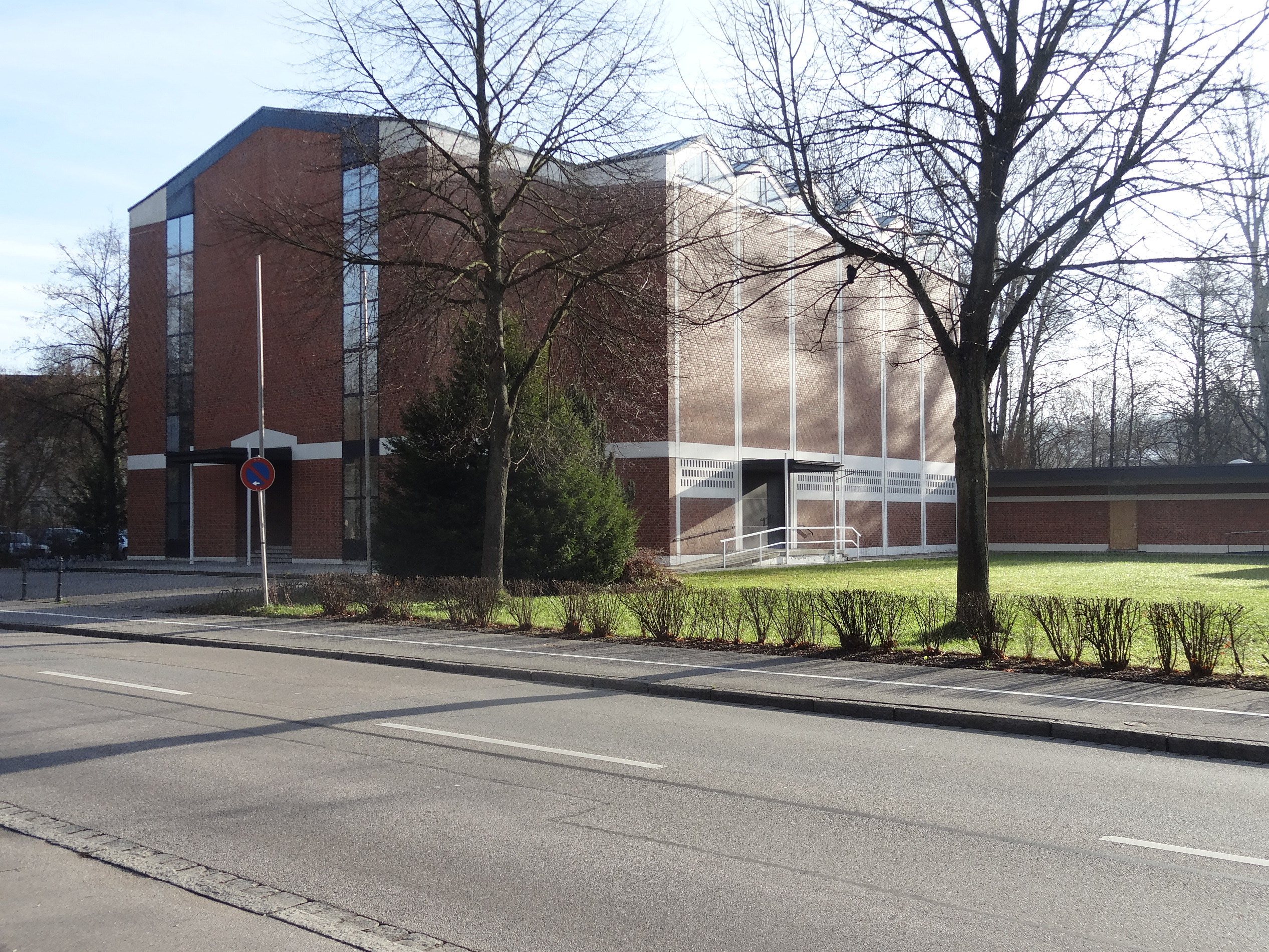 Katholische Pfarrkirche St. Pius in Landshut